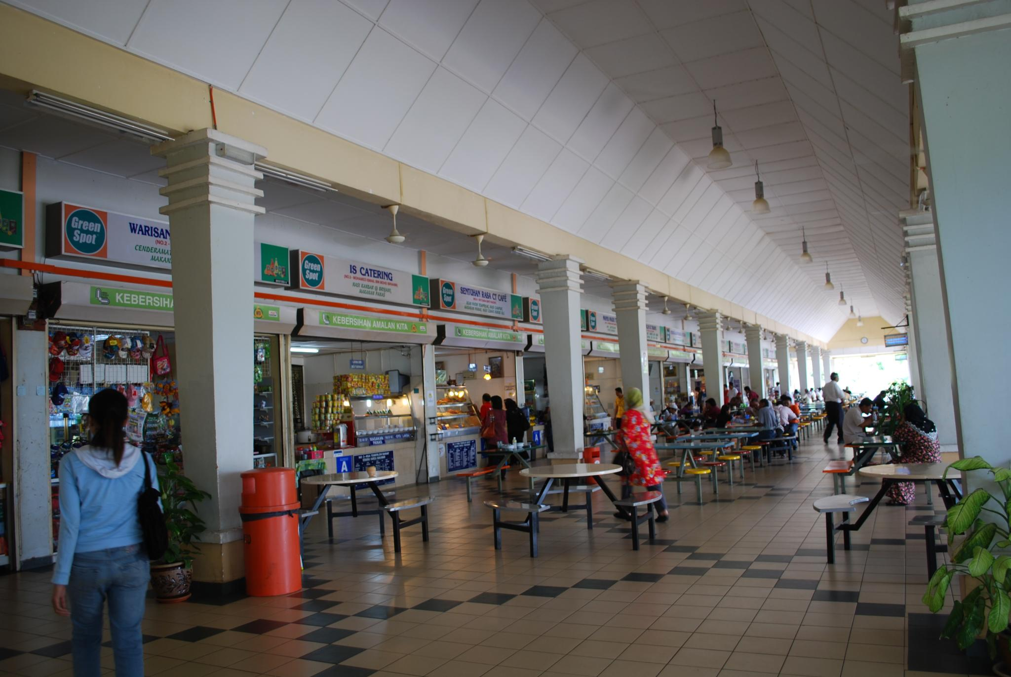 Kawasan Rawat dan Rehat Temerloh arah Barat